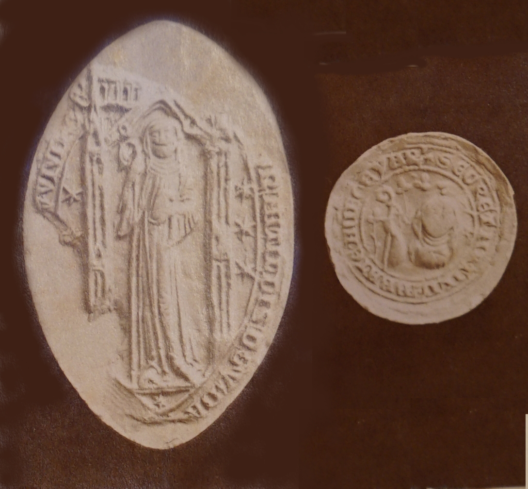 une image de l'abbaye d'andecy.